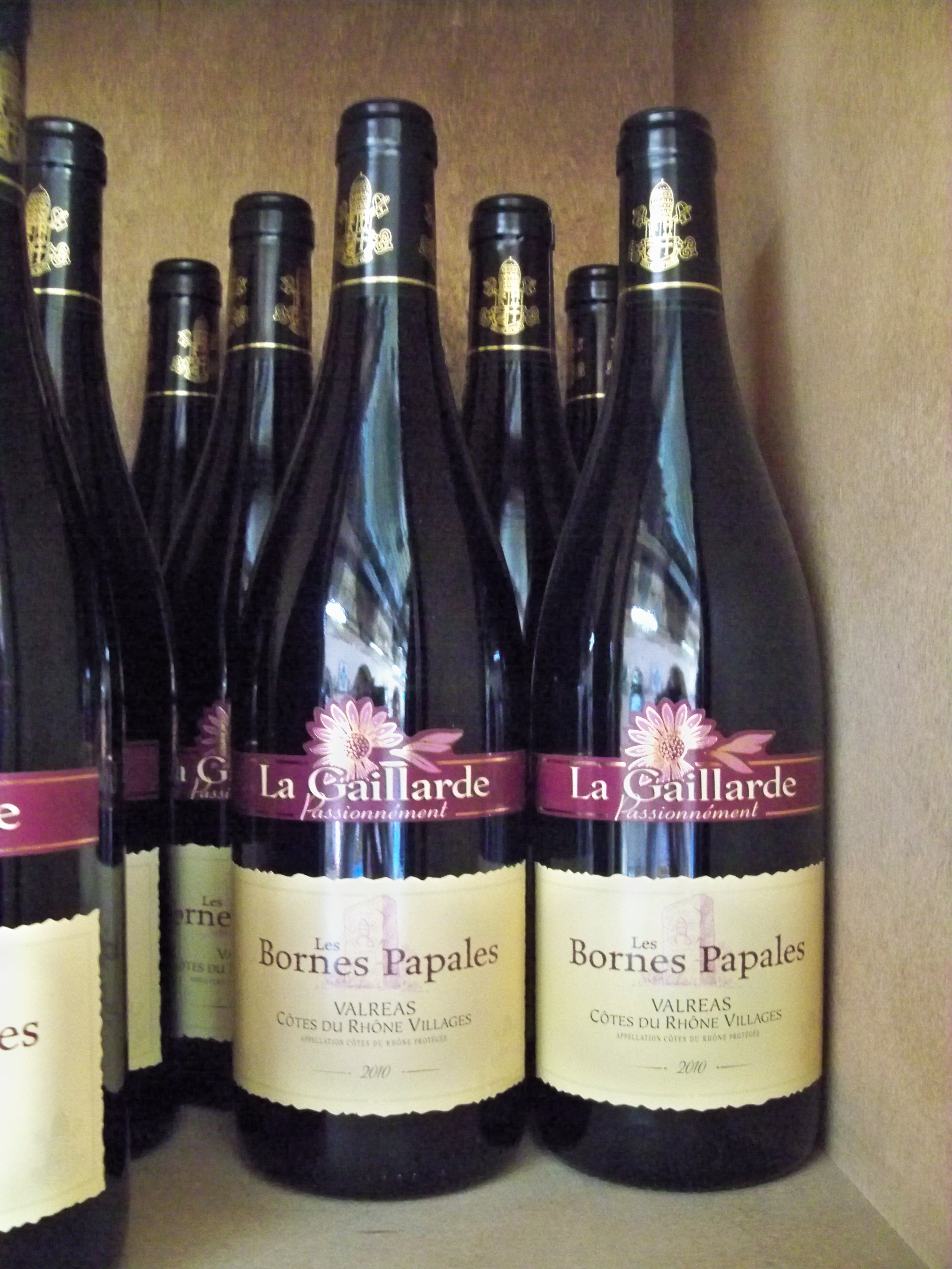 production de la Cave La Gaillarde de Valréas